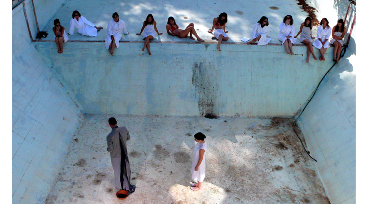 פרויקט סוטה מאת עפרי כנעני, 2011 א